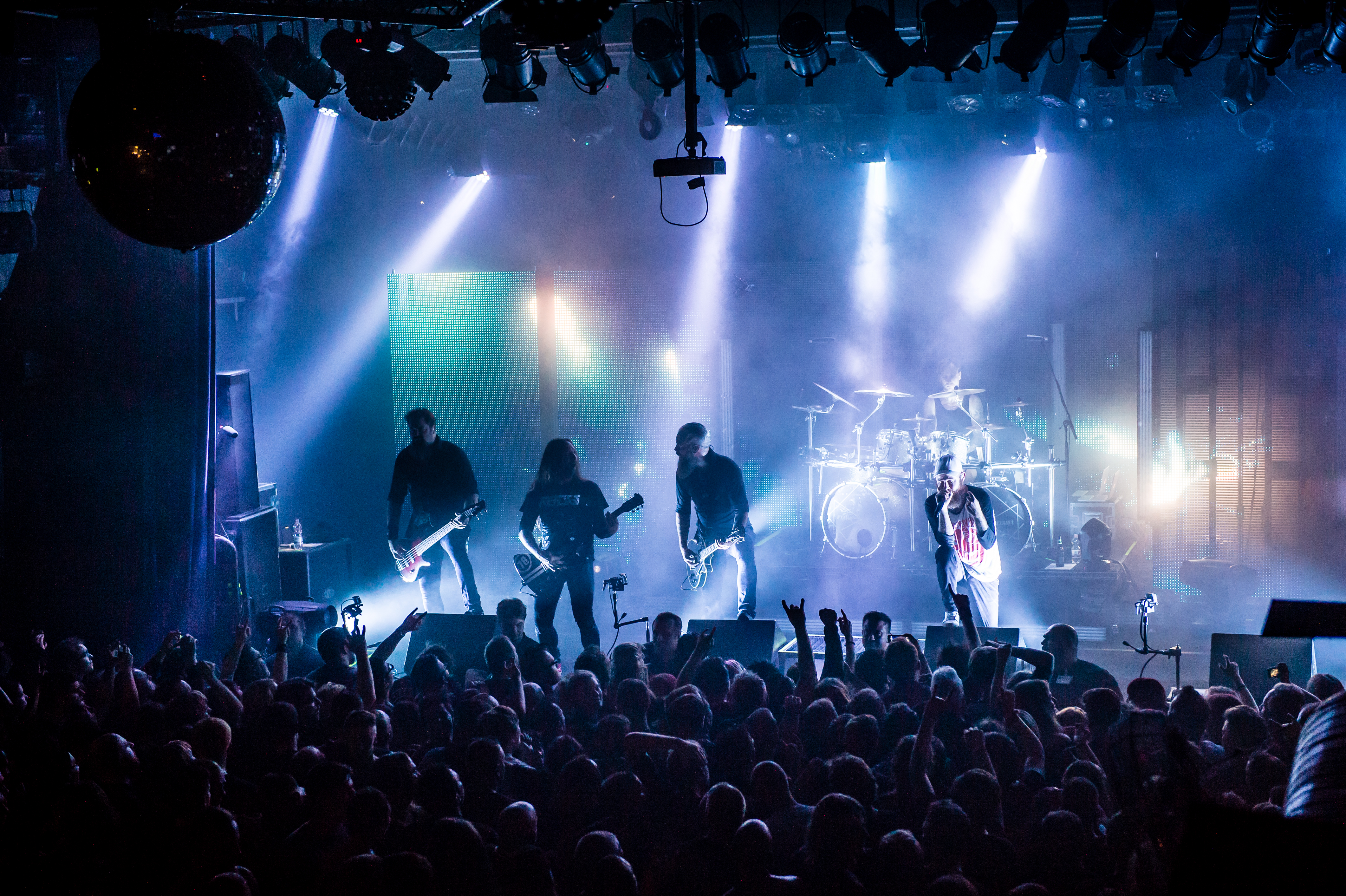 'In Flames Tour 2015 Bochum'